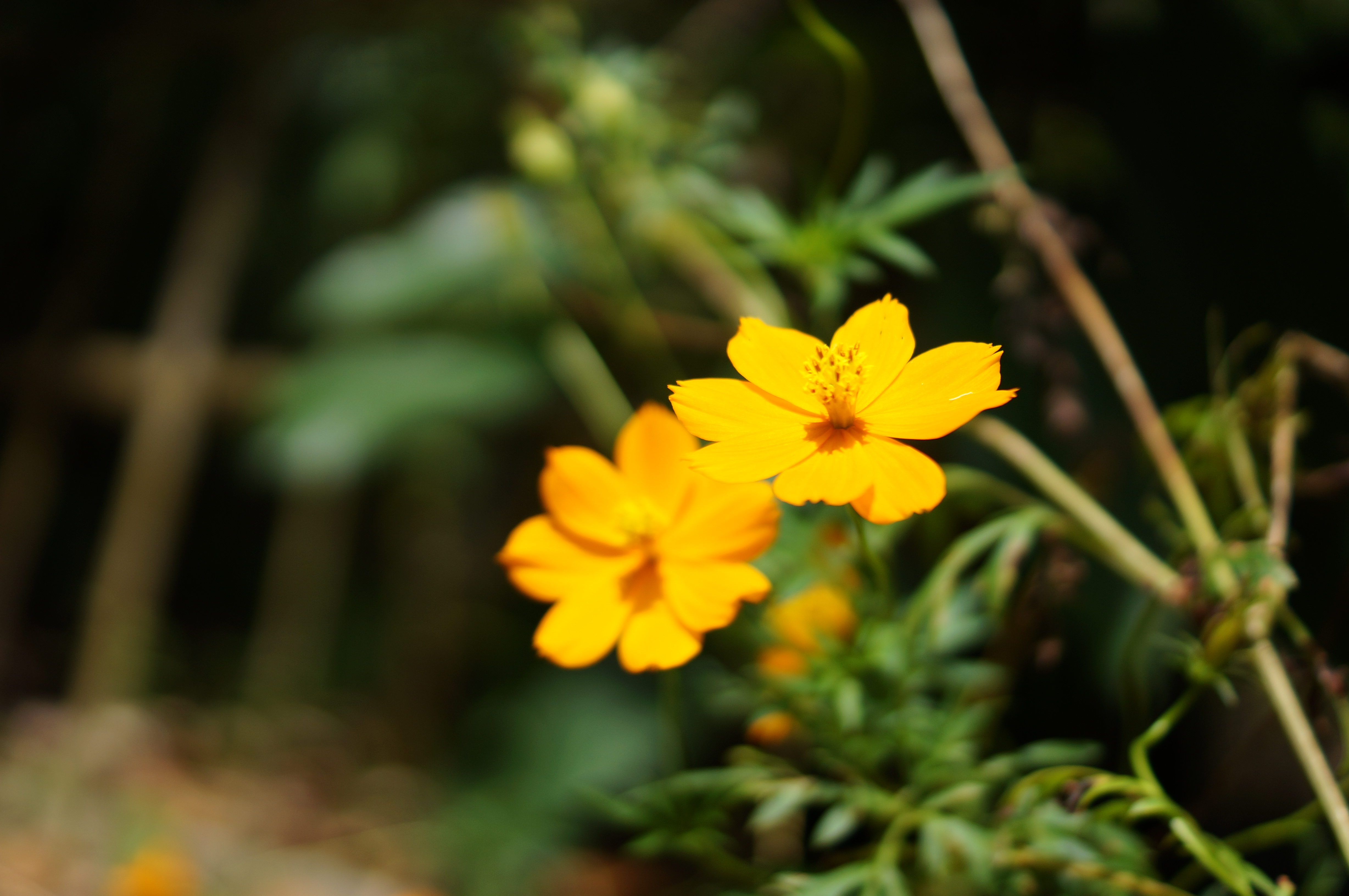 Cosmos sulphureus Cav., 1791